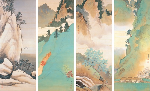 タイトル 「四季山水」